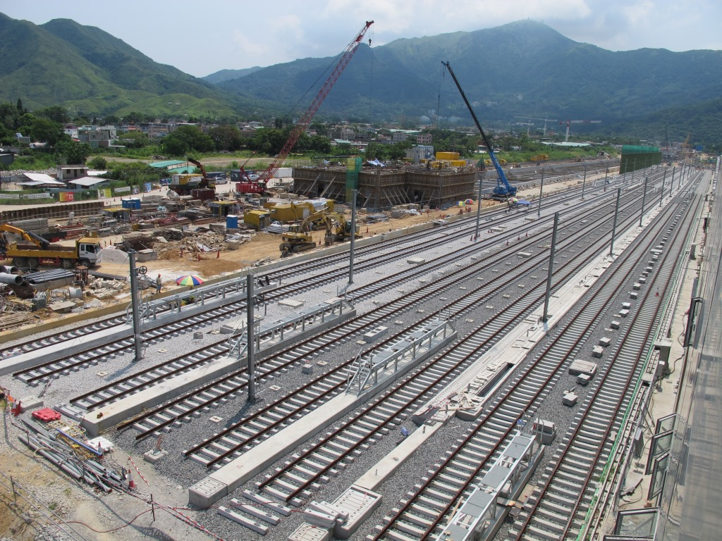 廣深港高速鐵路石崗救援站